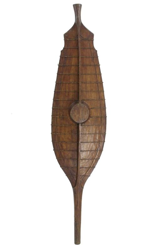 Schild. Langwerpig houten schild met rotan banden over de breedte Unknown language: Baluse